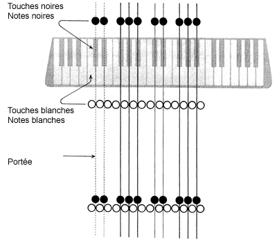 Klavarskribo